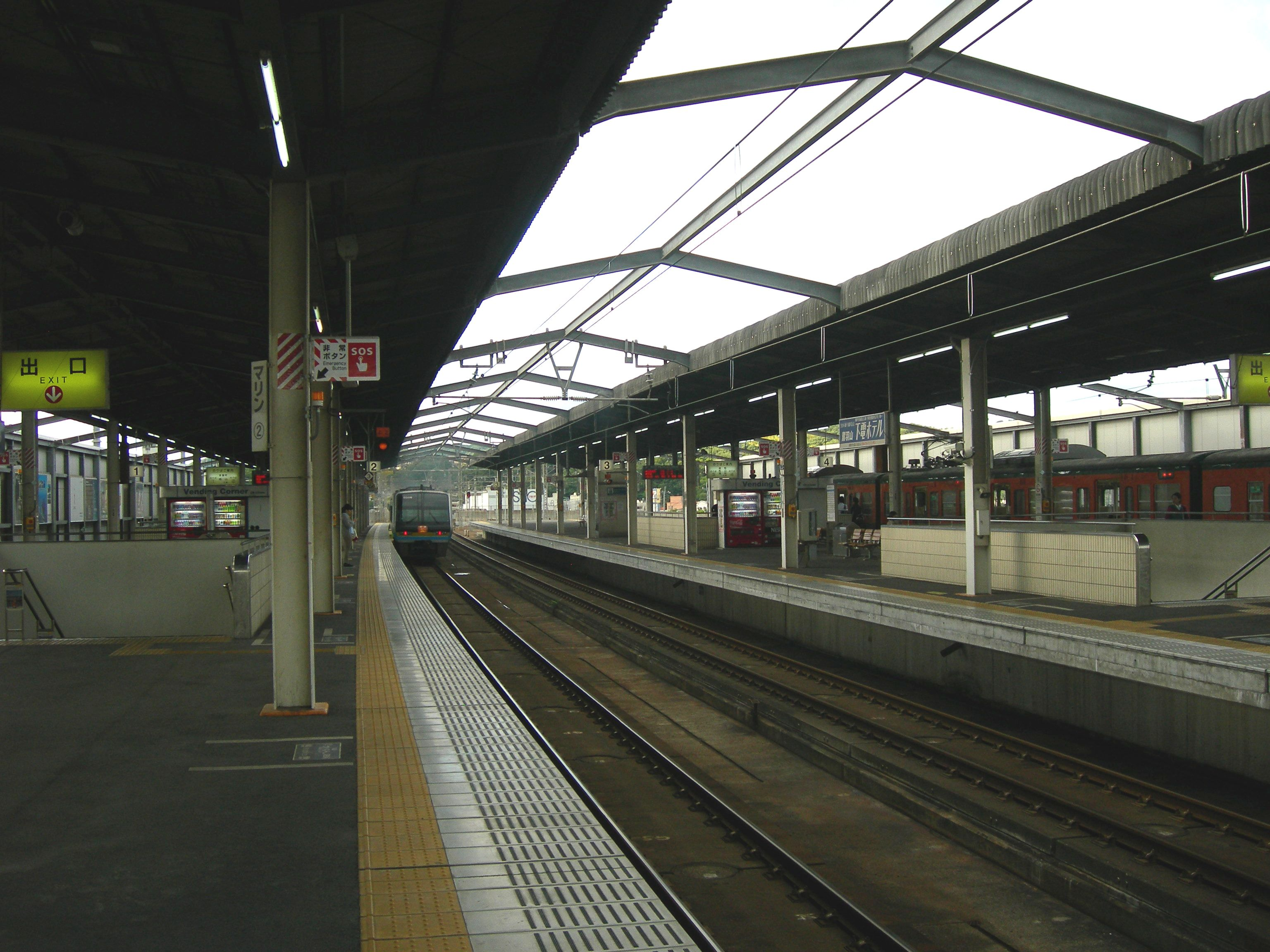 児島駅ホーム